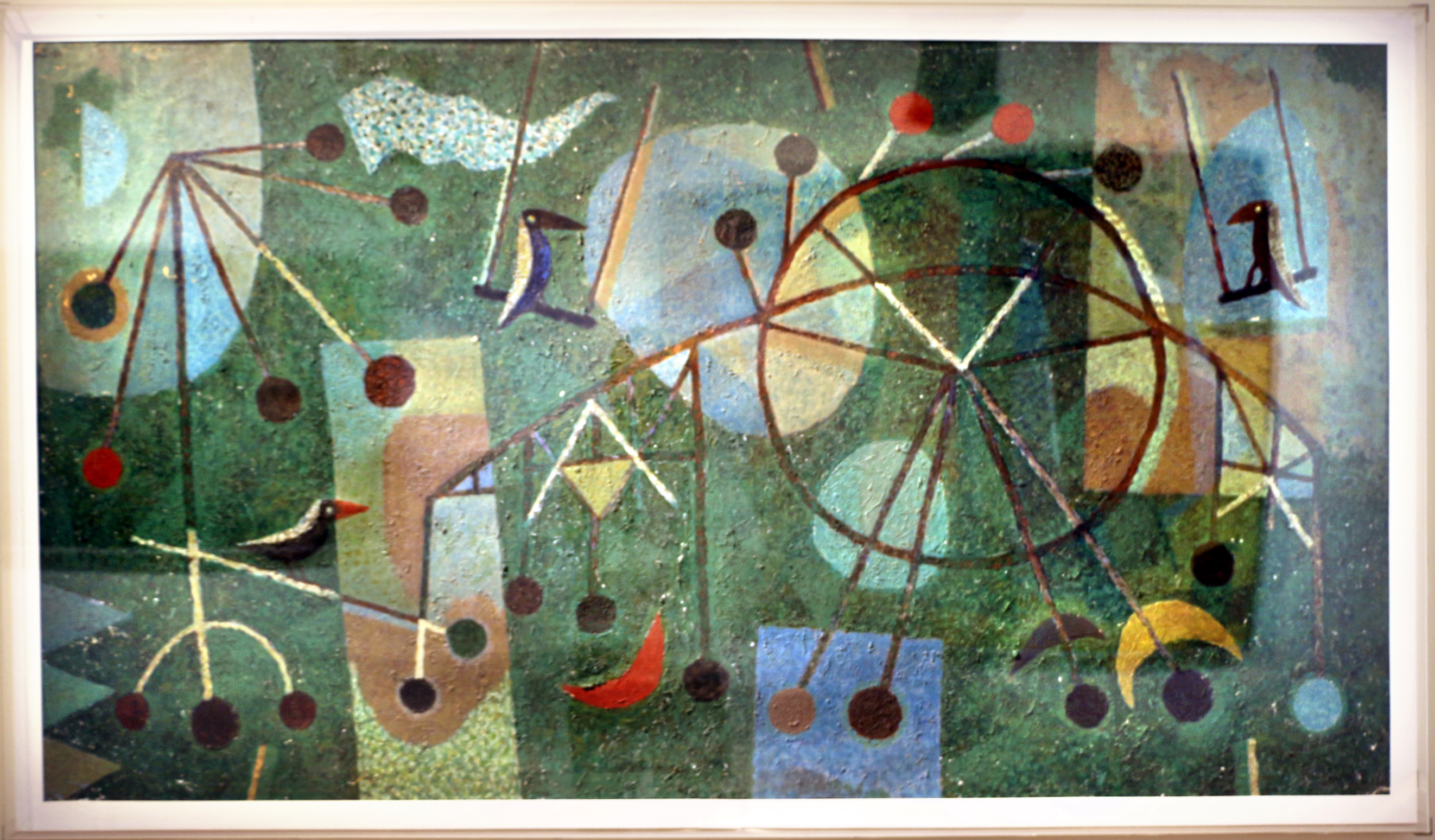 Collezione Mosaici Moderni - NB: Museum explicitly authorized the upload of its contemporary art collection for WLM 2016 (for further info ask WLM Italy organizators). This is a photo of a monument which is part of cultural heritage of Italy.